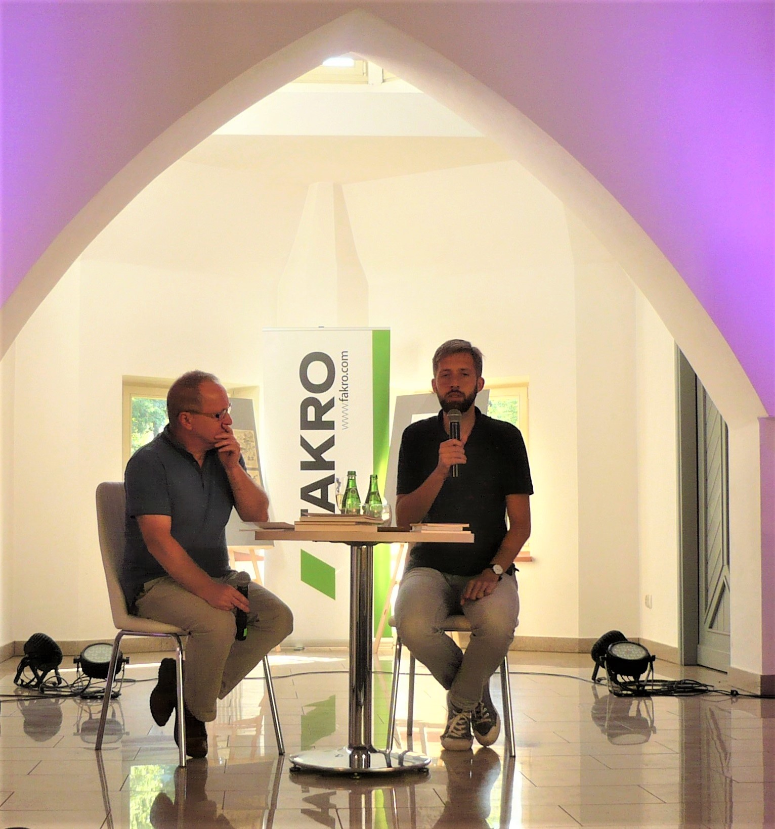 Karol Maliszewski i Jakub Kornhauser